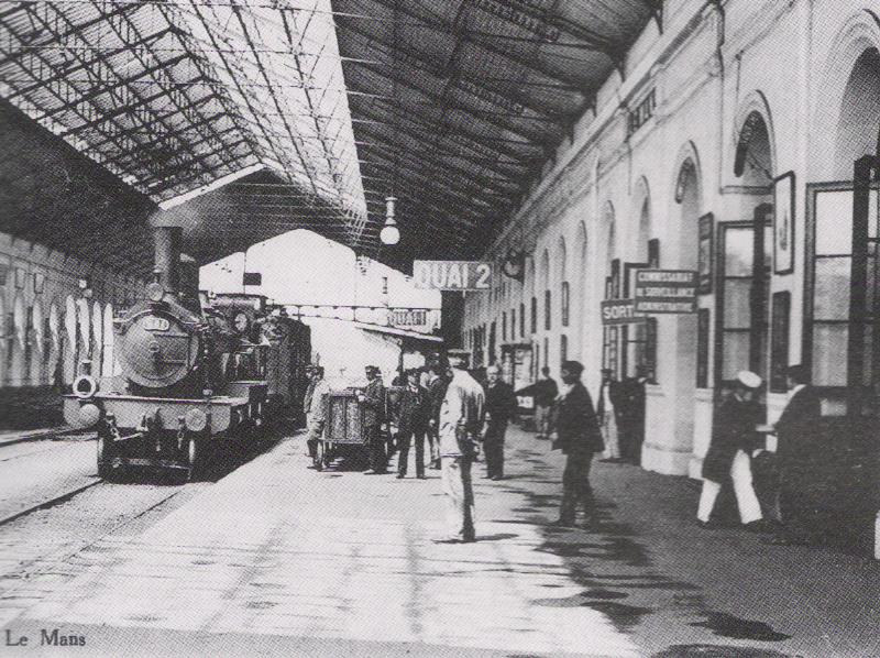 Un train remorqué par une locomotive type 220 série 671 à 690 de la Compagnie des chemins de fer de l'Ouest en gare du Mans. Vue des quais avant 1909 avec seulement deux voies.